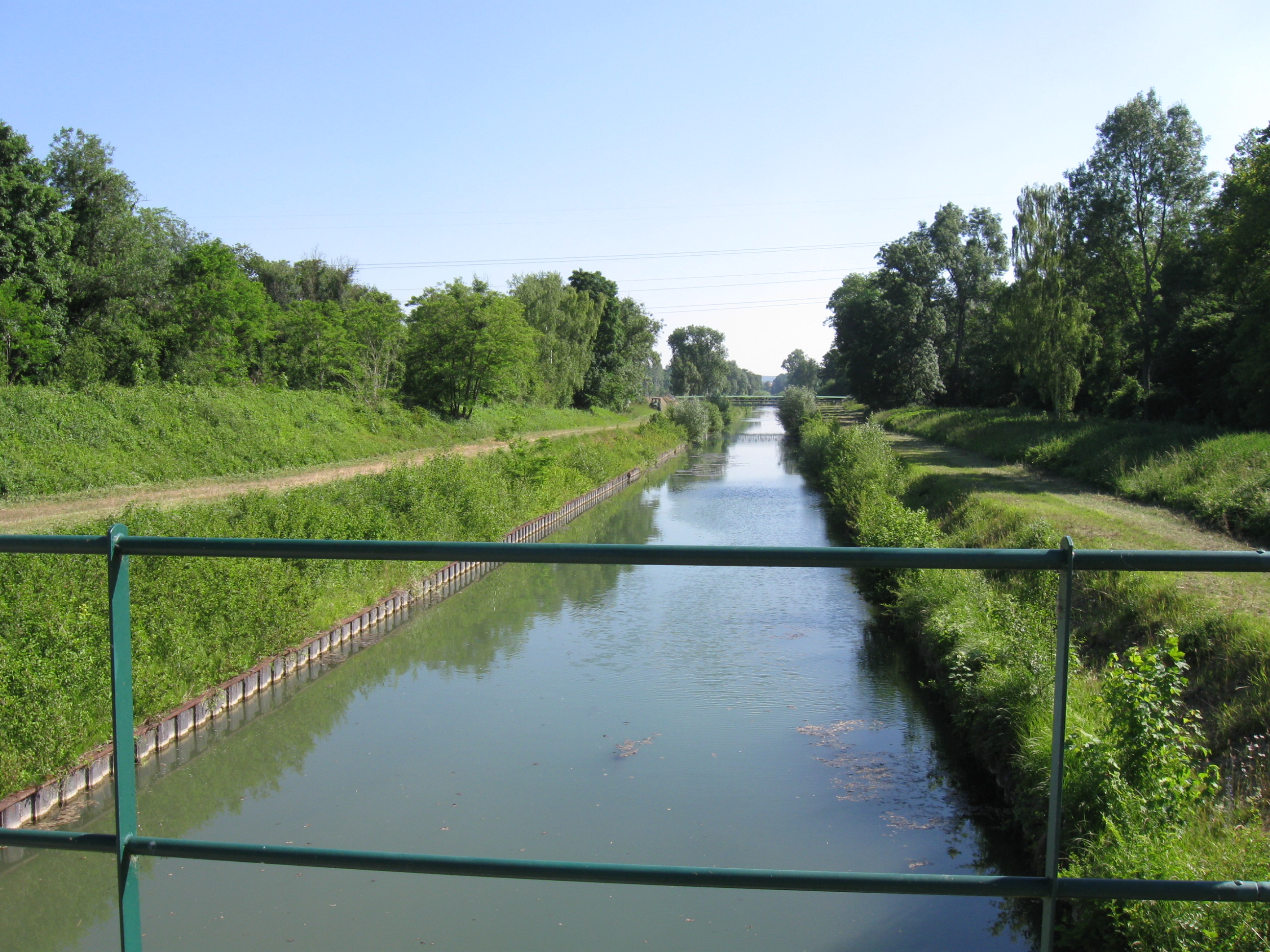 Canal des Ormes à Saint-Sauveur-lès-Bray. (Seine-et-Marne, région Île-de-France).